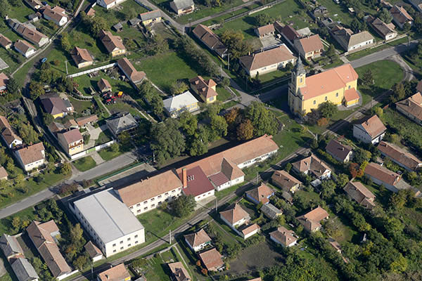 Alattyán légi fotó